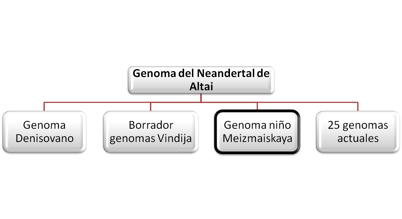 Comparison between Neandertal de Altai genome and other hominids by Prüfer et al., 2014